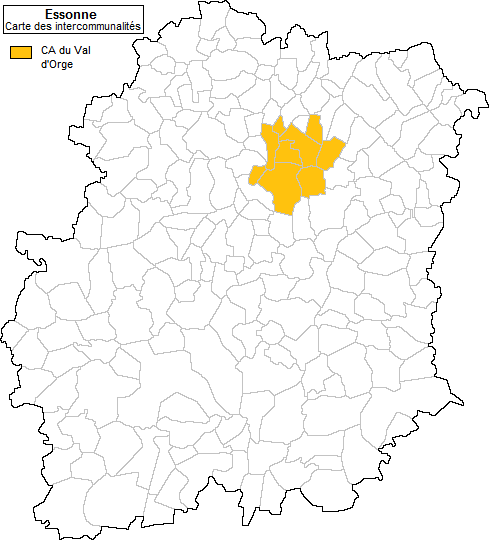 Carte des communes de la communauté d'agglomération du Val d'Orge en Essonne (91)